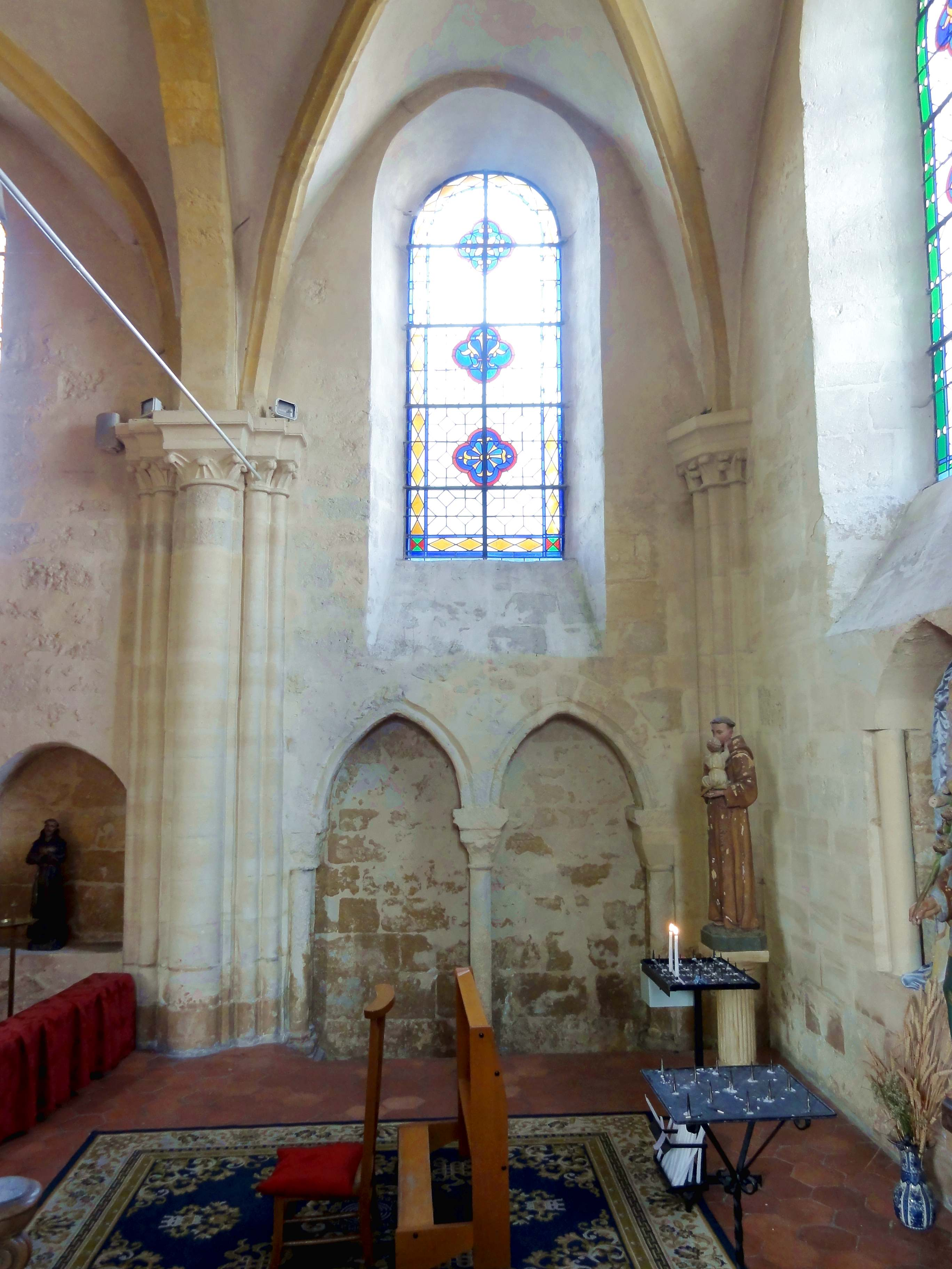 Intérieur de l'église - voir titre.